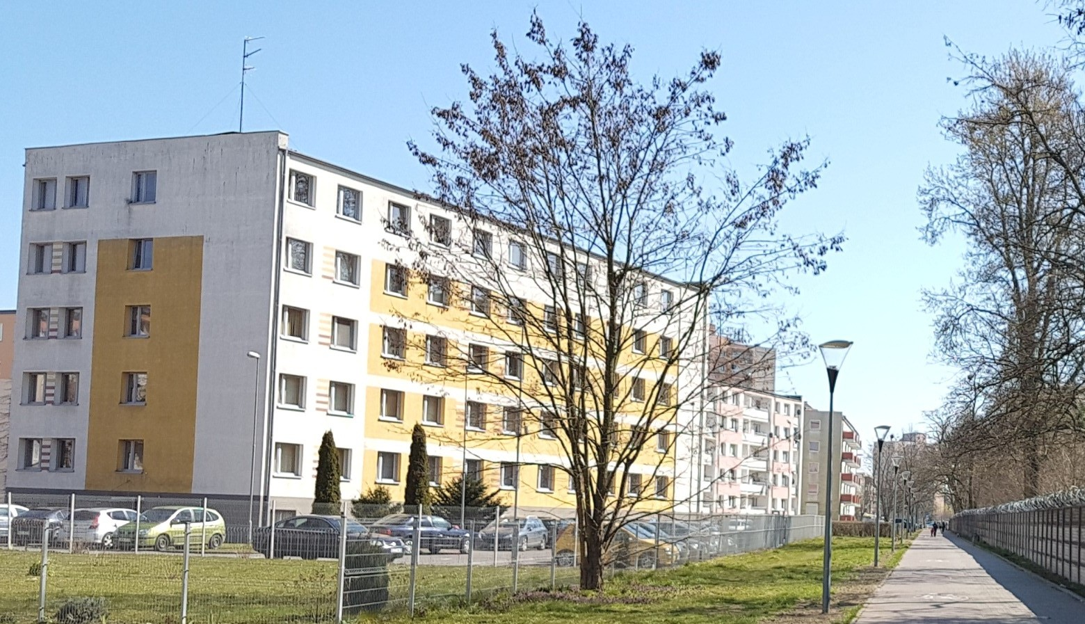 Osiedle Halera. Hotel Huzar